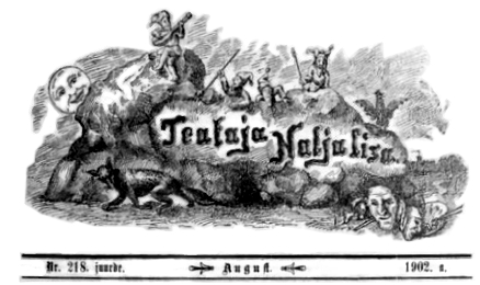 Ajalehe "Teataja Nalja lisa" päismik